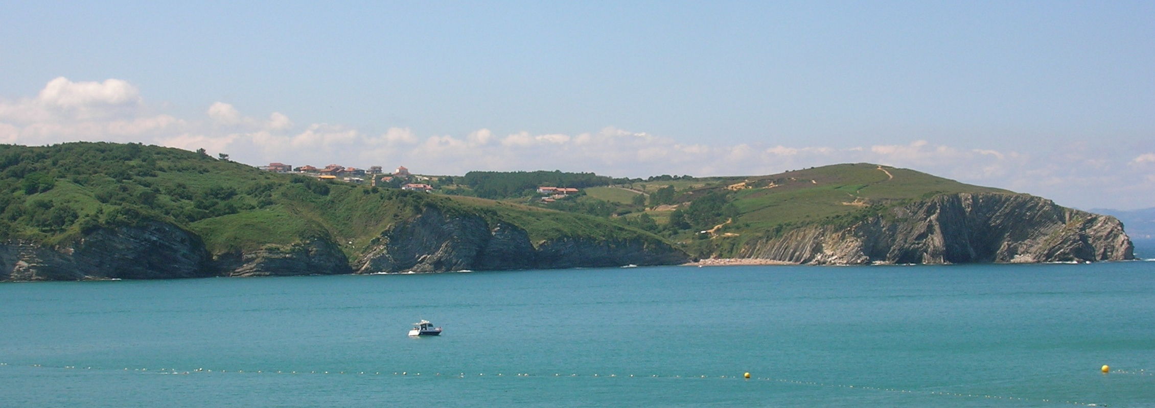 Barrika